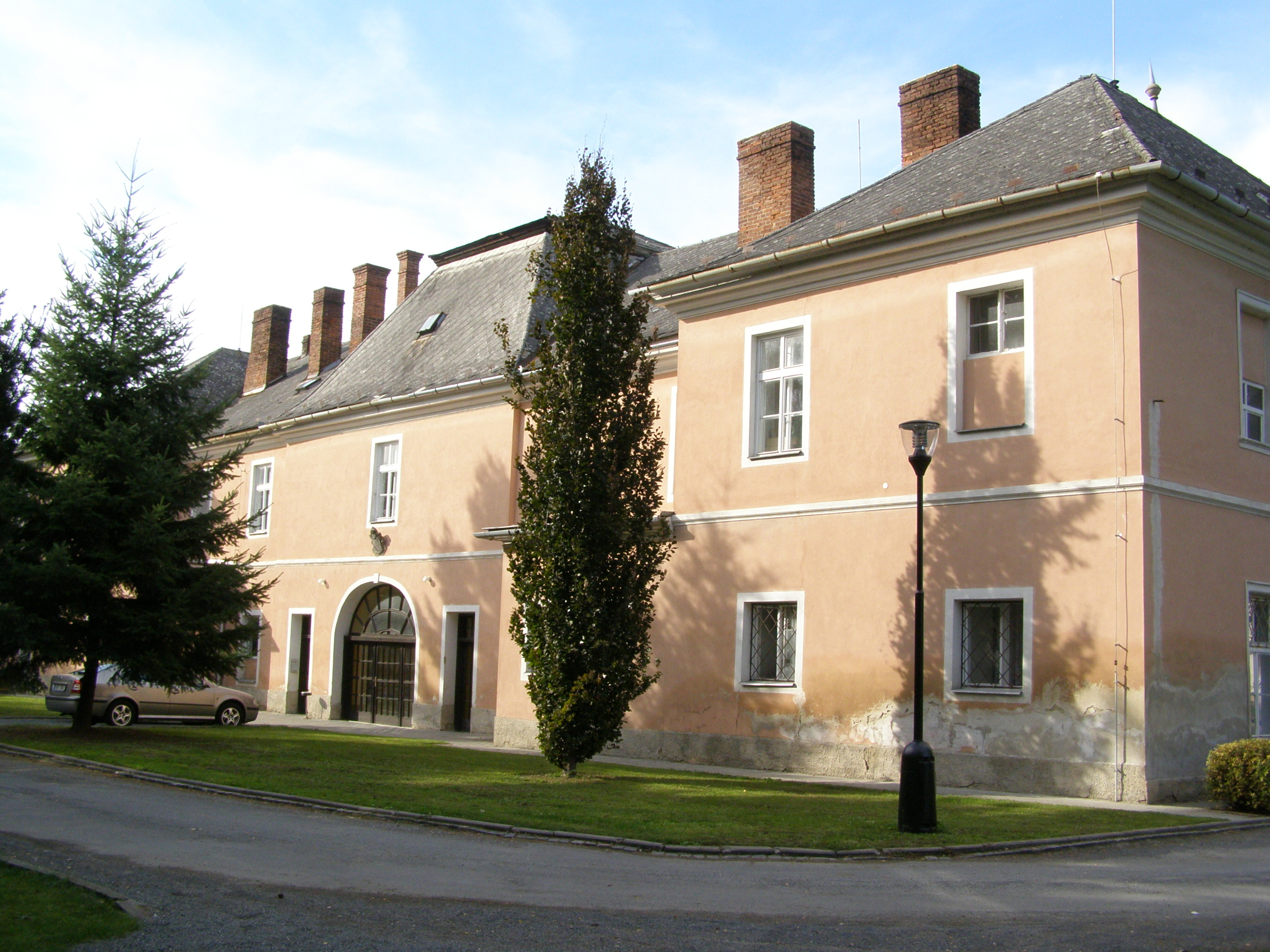 Zámek Velký Týnec, Zámecká 35, Velký Týnec